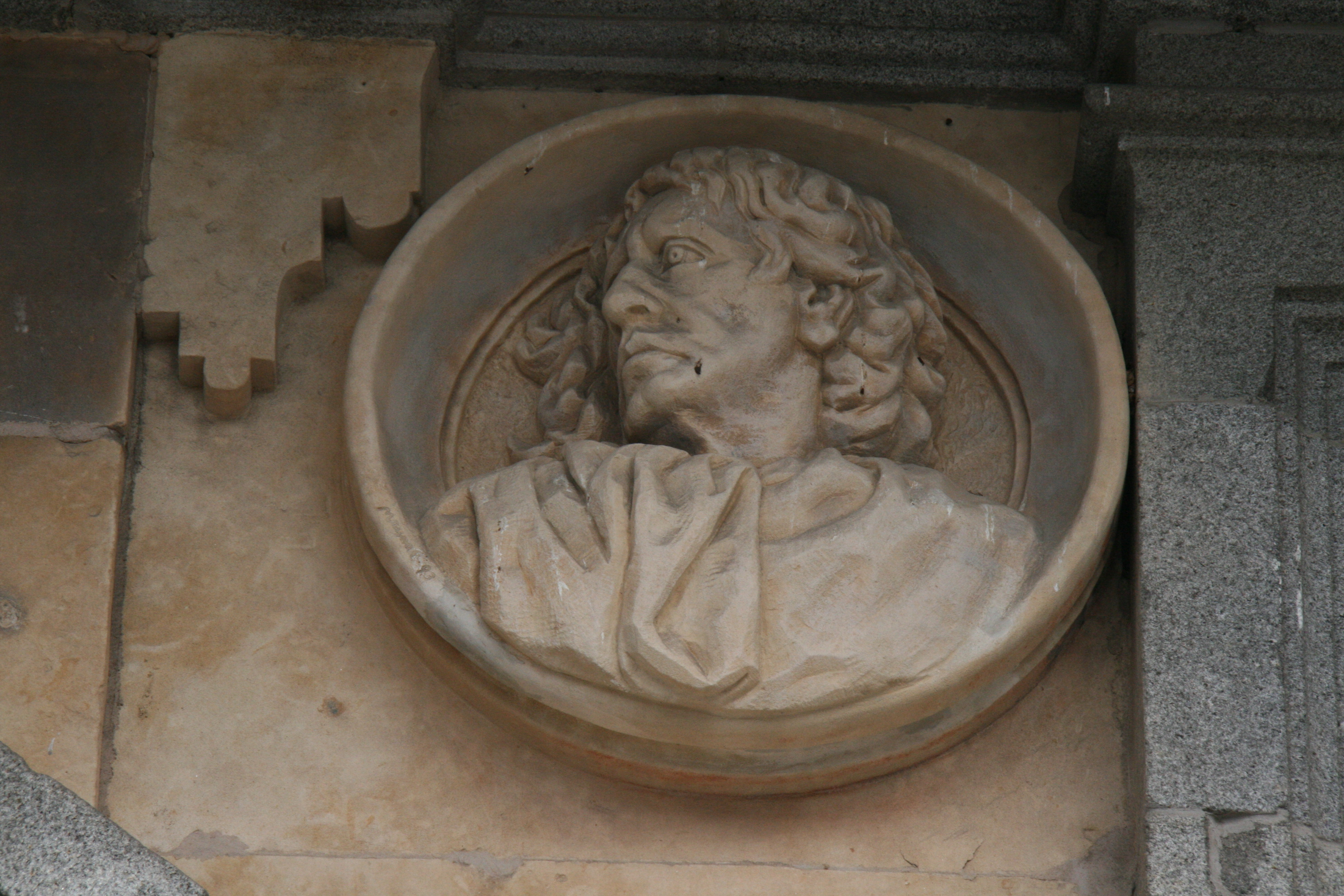 Medallón con la efigie de Alberto Churriguera en el Pabellón Consistorial de la Plaza de Salamanca